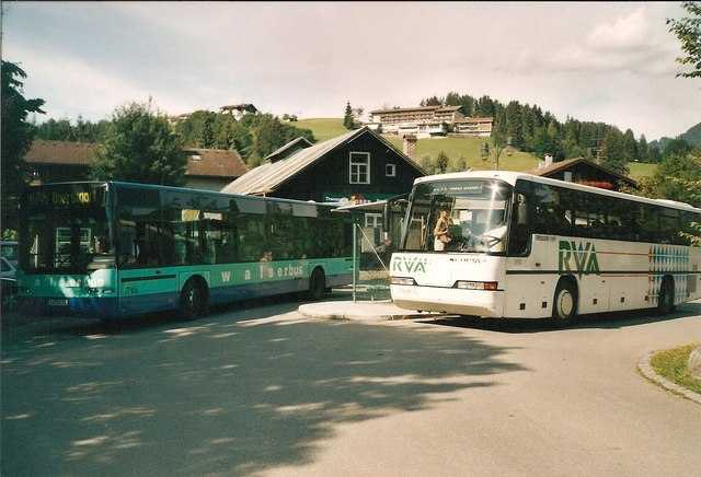 Busbahnhof, Fischen im Allgaeu